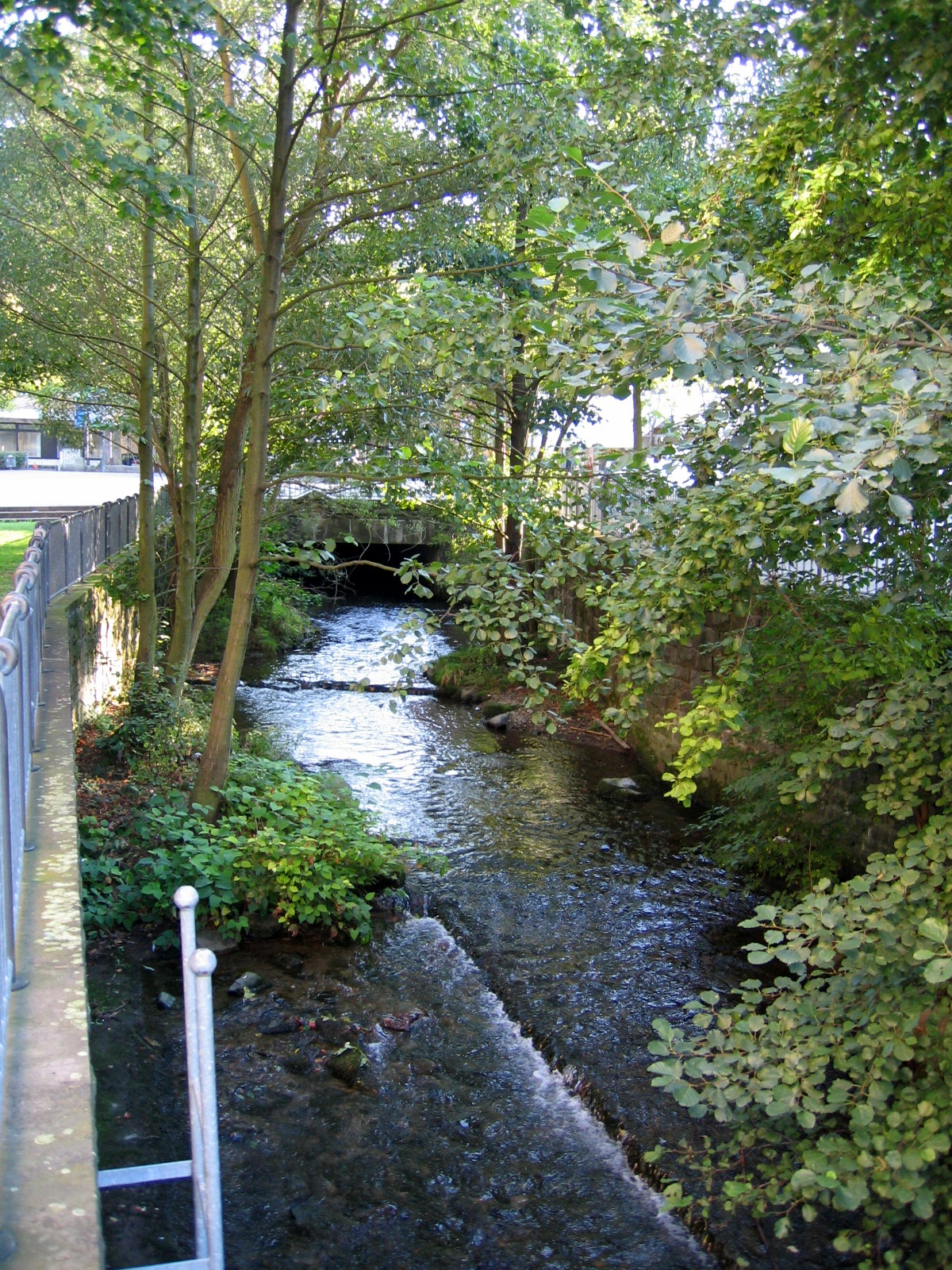 Bachlauf der Oese in der Innenstadt von Hemer.